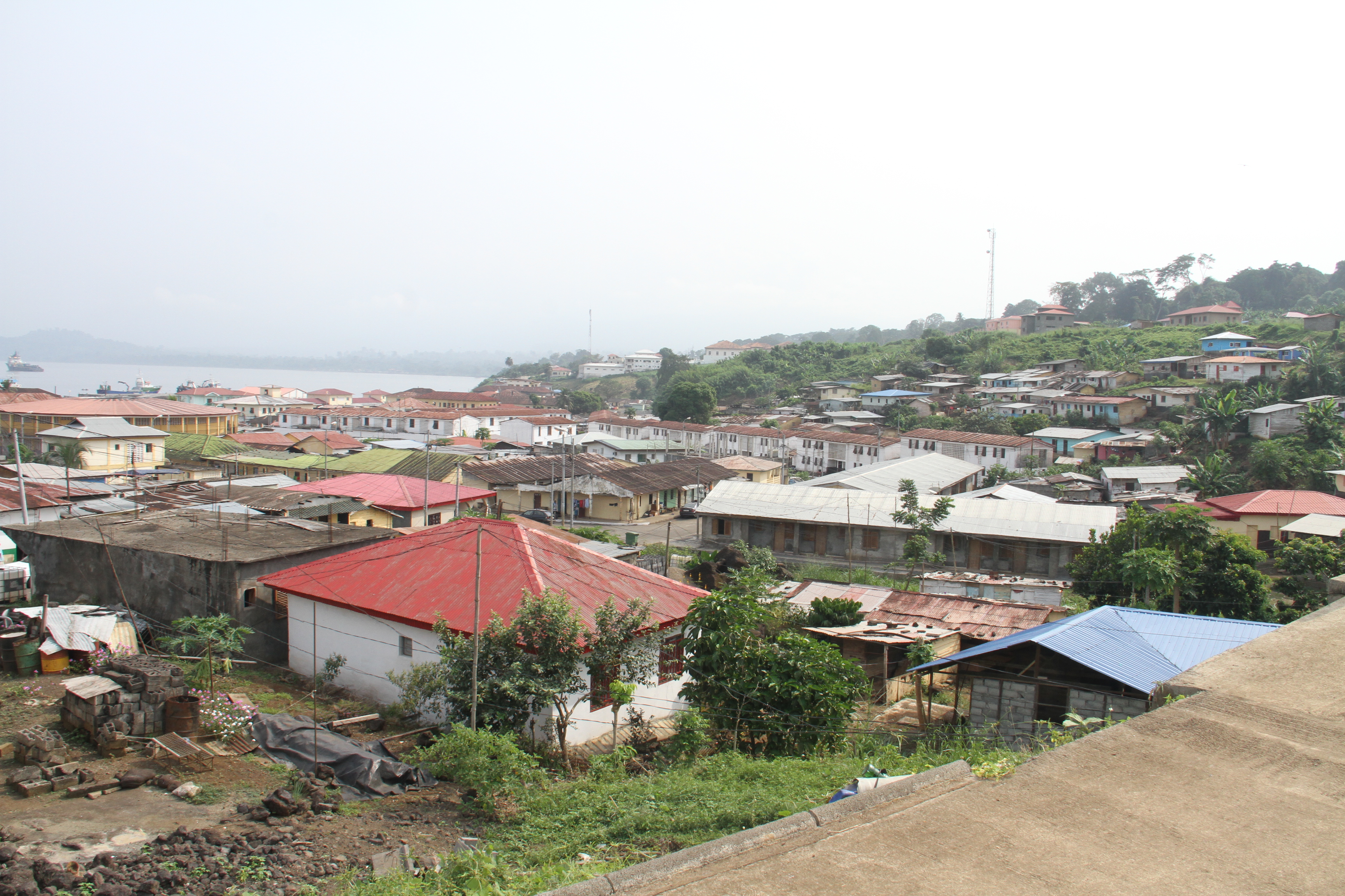 Ansicht von Luba The making of this document was supported by the Community-Budget of Wikimedia Germany.